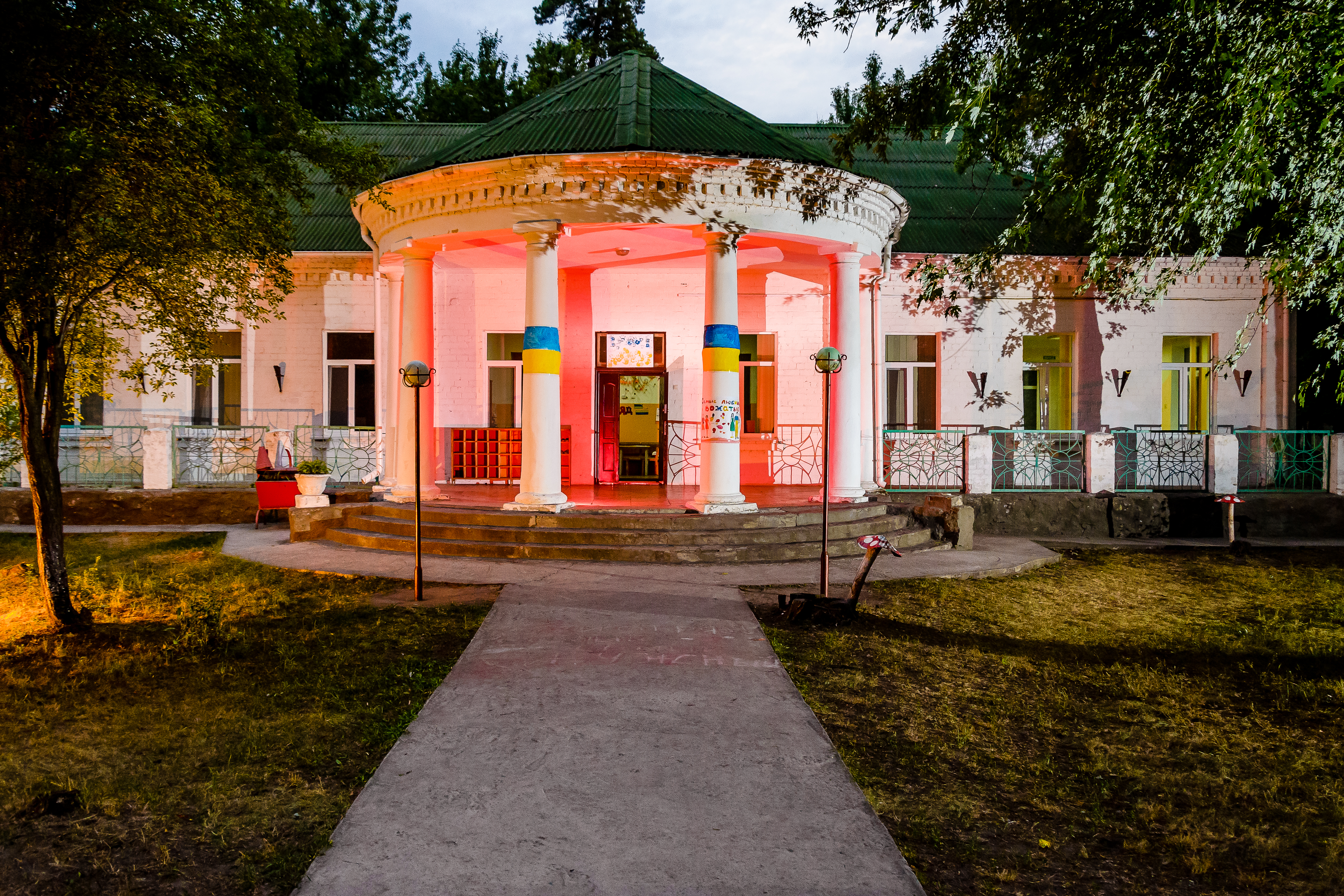 корпус